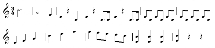 Openingsthema symfonie 97 van Haydn